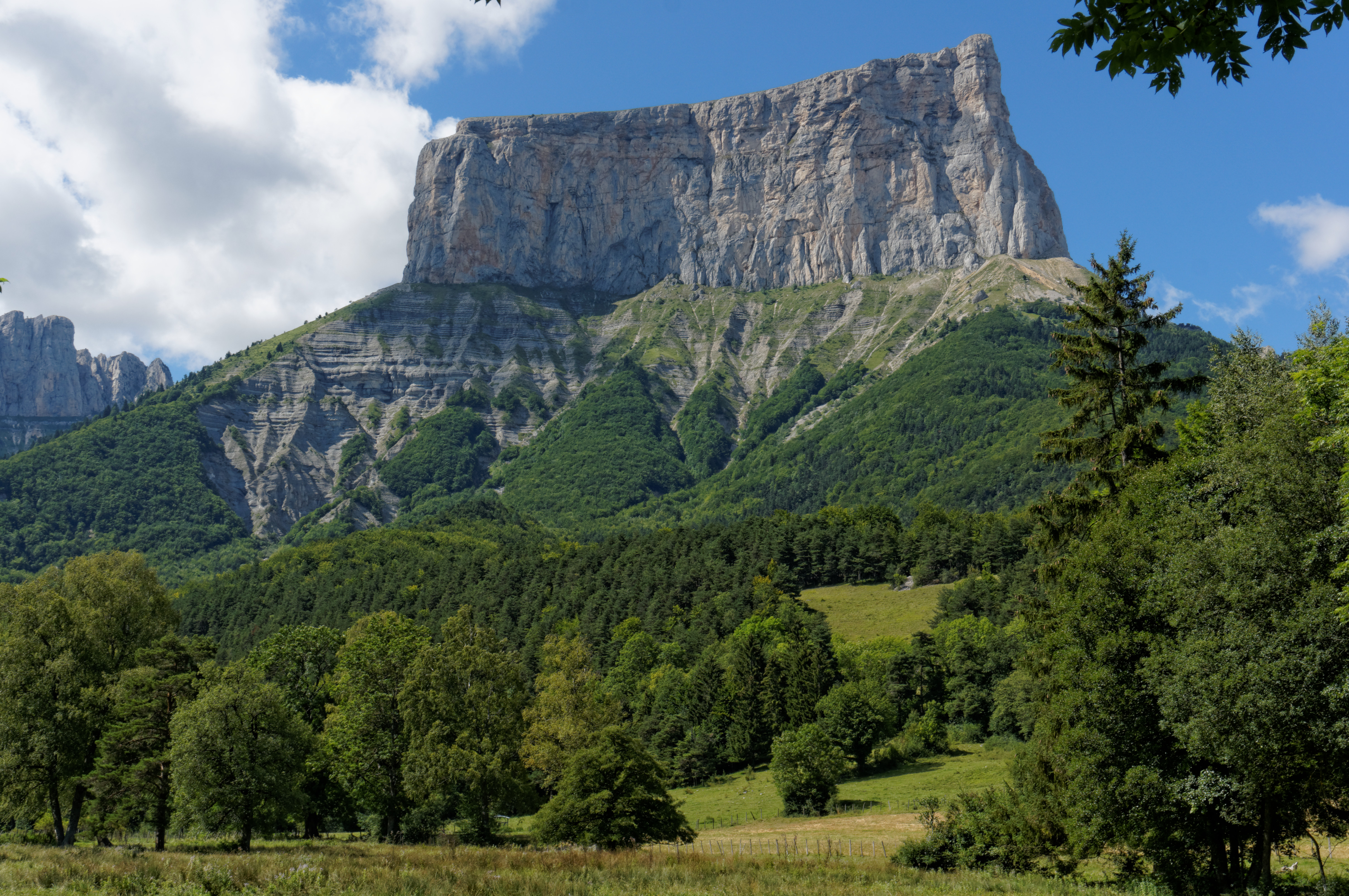 Le mont Aiguille vu du hameau de Ruthière